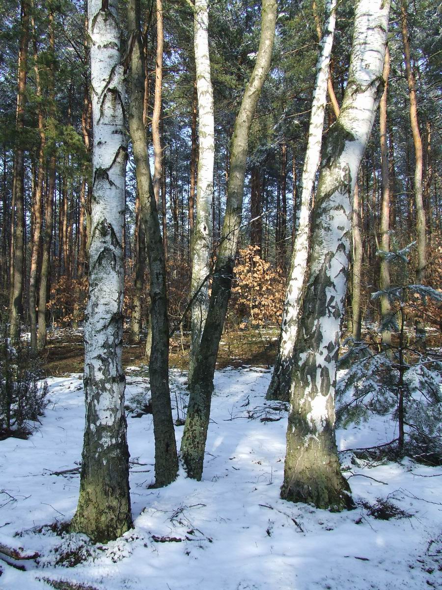 Betula pendula and 2 Betula x aurata (syn. Betula x obscura) between them, Kampinoski Park Narodowy, Poland